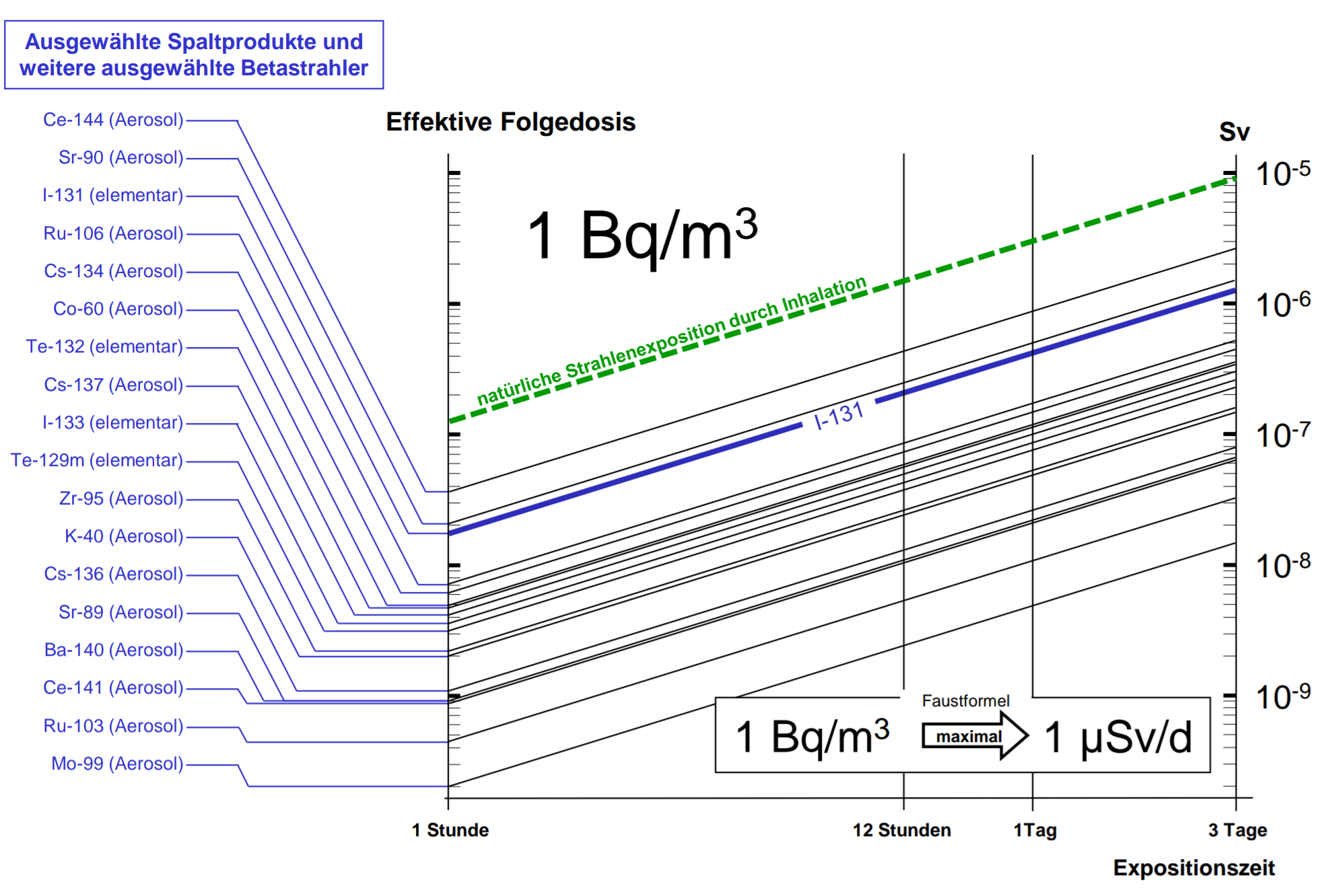 Dosisaufnahme (effektive Folgedosis) durch Inhalation ausgewählter Radionuklide bei bekannter Aktivitätskonzentration in der Luft